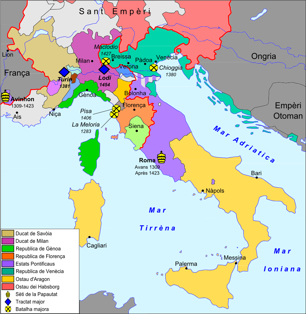 Itàlia en 1454 après la Patz de Lodi.